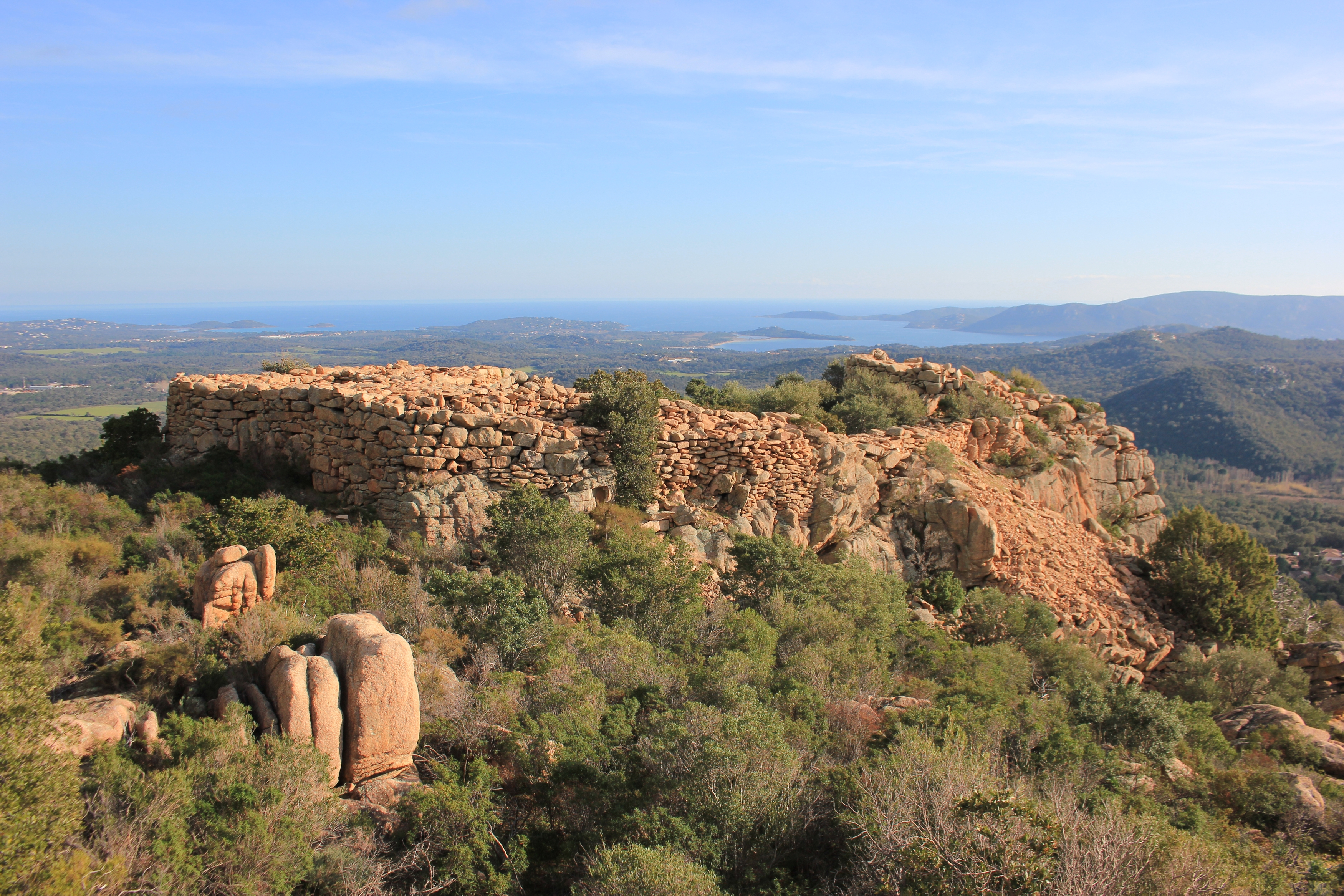 Prähistorische Ruinen des Casteddu d'Araghju bei Porto-Vecchio, Korsika